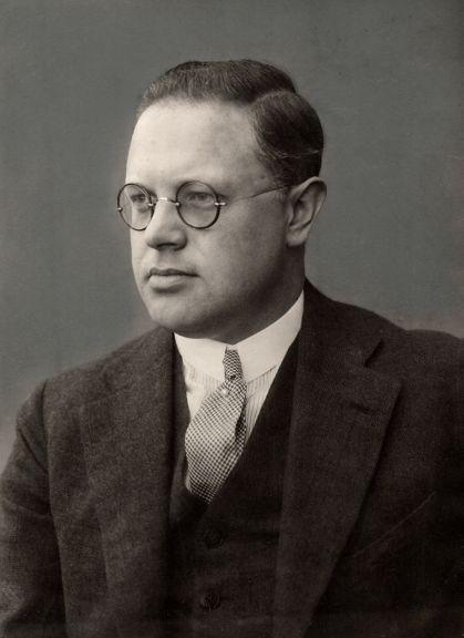 Portret van Carl Romme, Minister van sociale zaken in het Vierde Kabinet-Colijn. Datum onbekend.